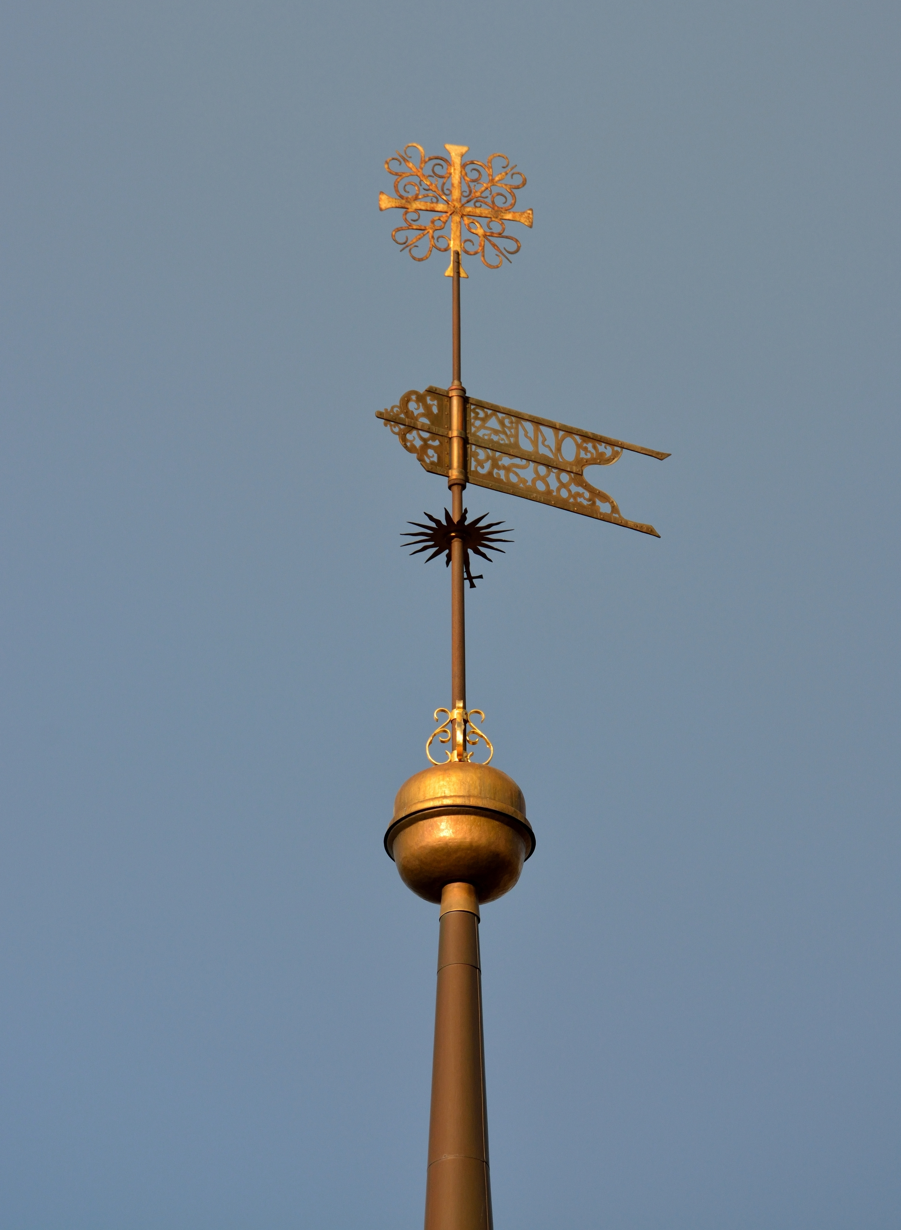 Tallinna Pühavaimu kirikutorni muna ja tuulelipp